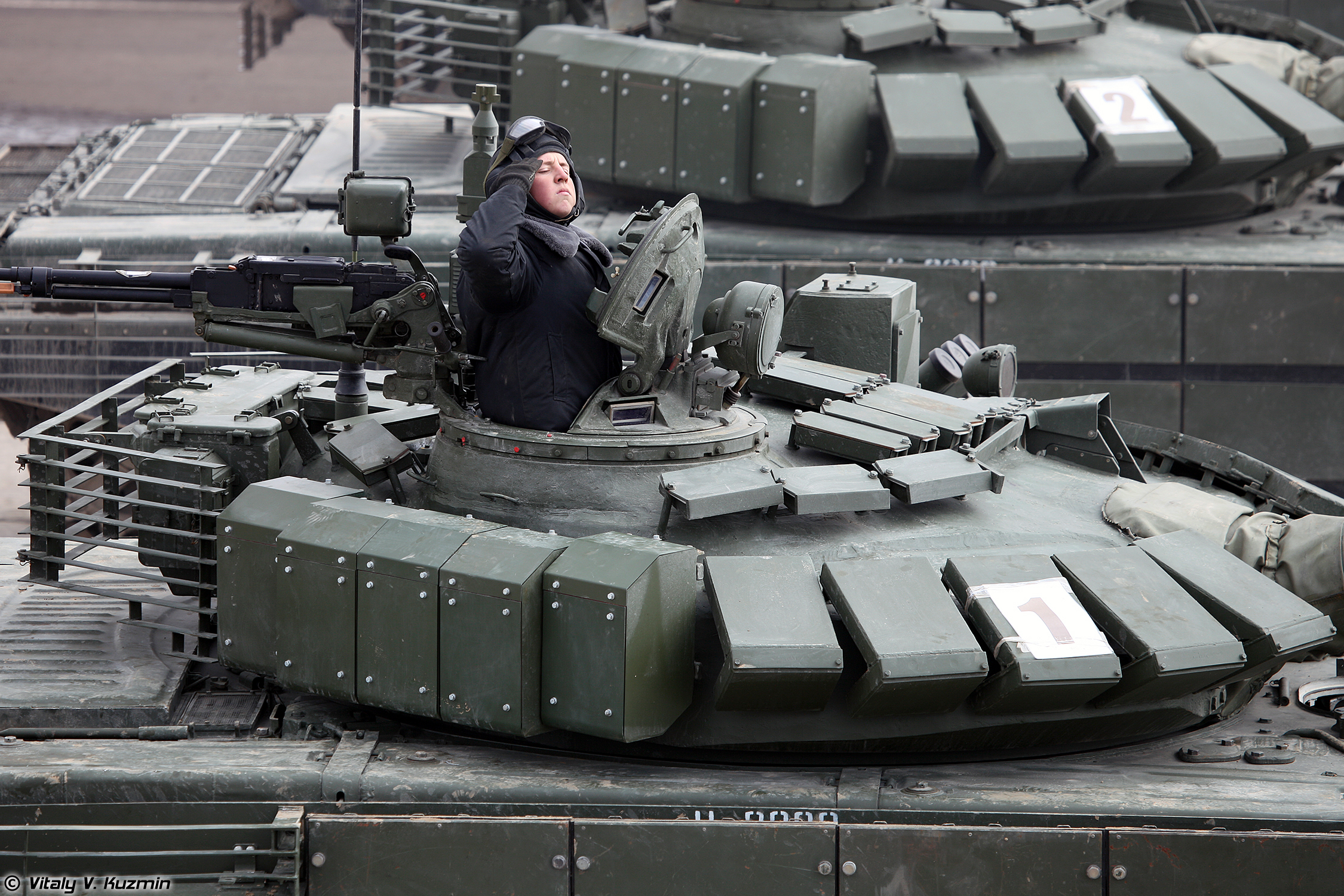 Модернизированный Т-72Б3 образца 2016 года с дополнительной защитой (Modernized T-72B3 with additional armor)